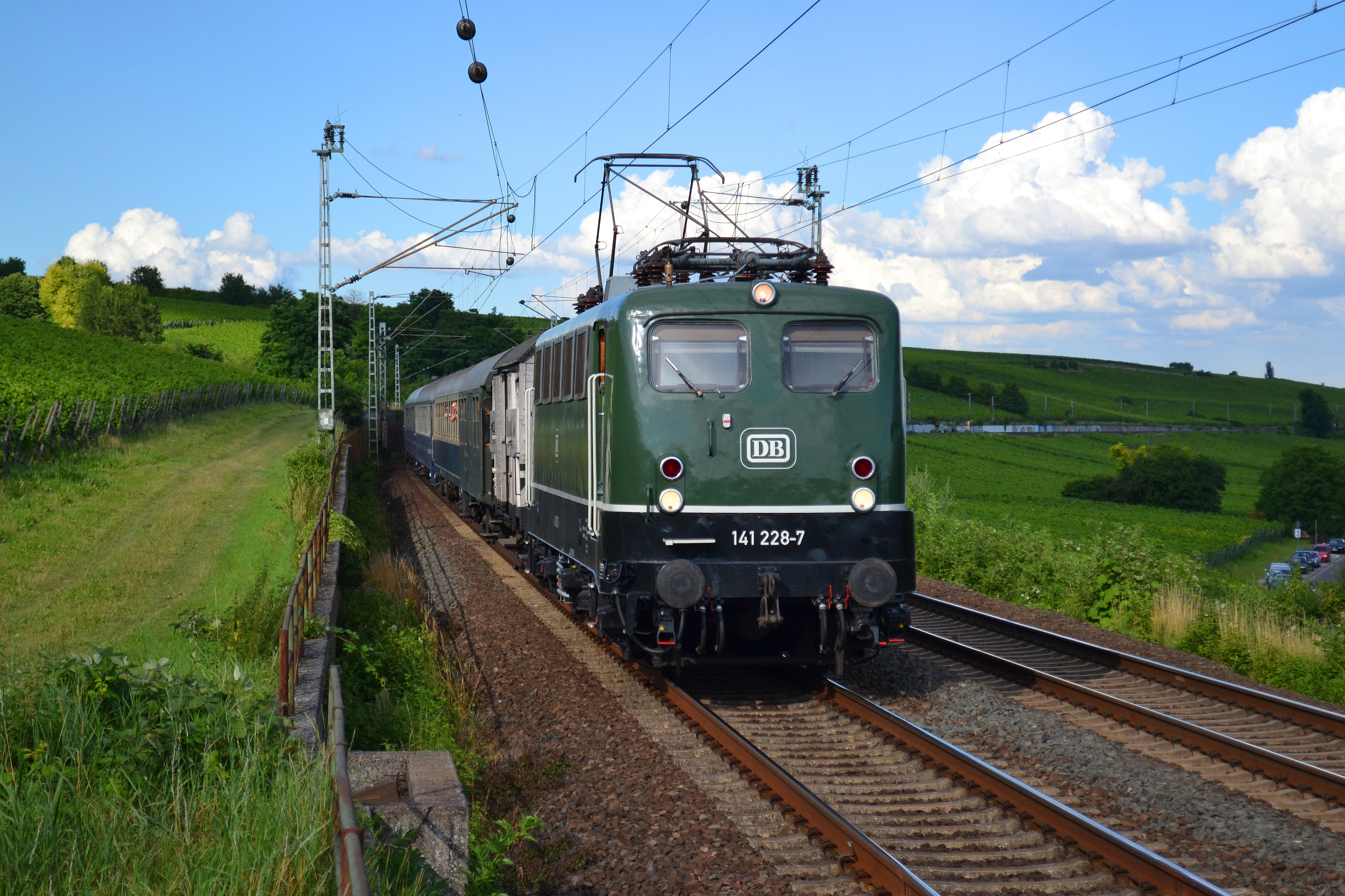 Eine Lokomotive der Baureihe 141 mit einem Sonderzug bei Hattenheim auf der rechten Rheinstrecke.